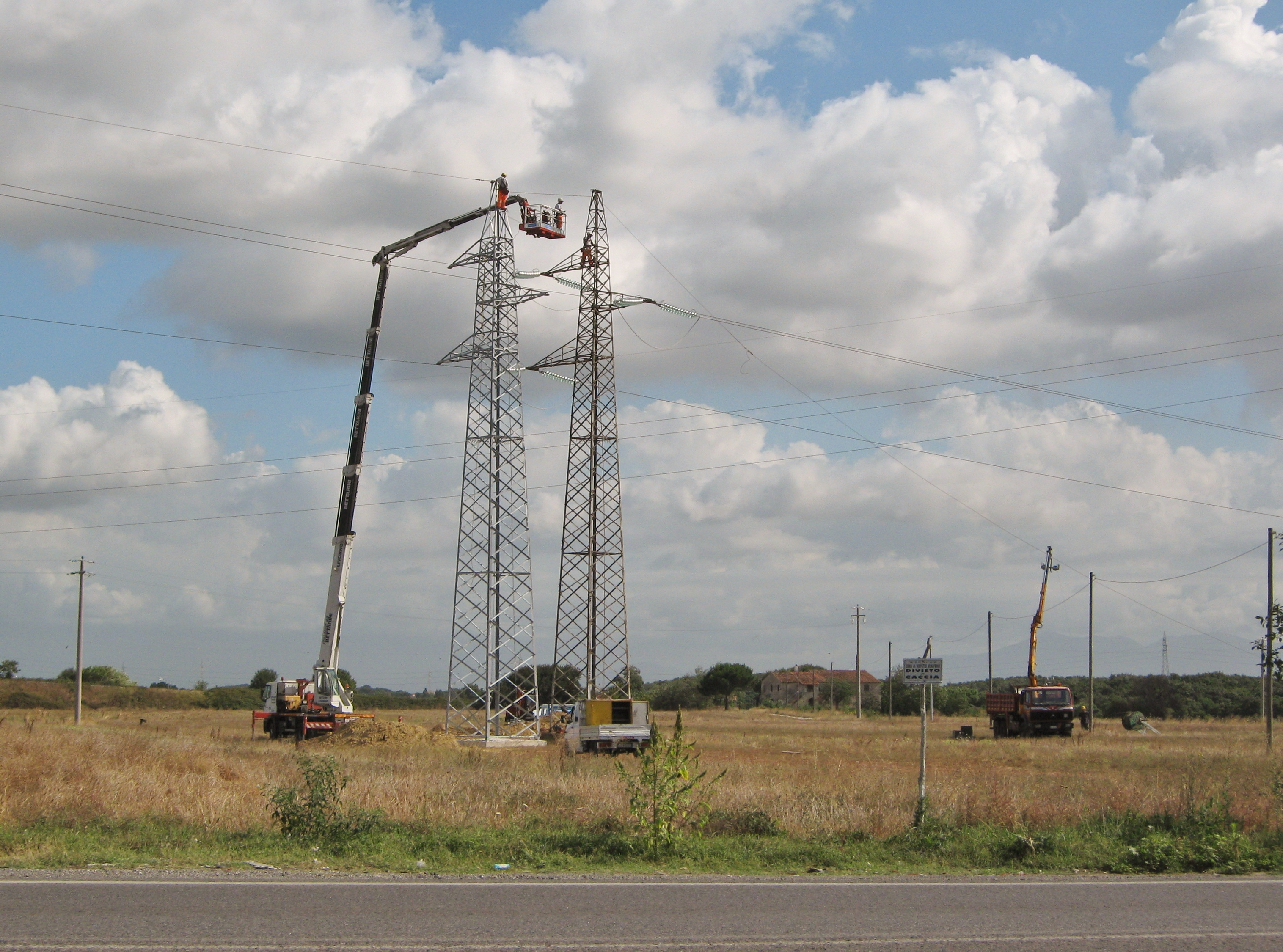 Livorno: un traliccio di un elettrodotto ad alta tensione, realizzato prima della seconda guerra mondiale, durante le operazioni di smantellamento; a lato è già sorto il nuovo traliccio